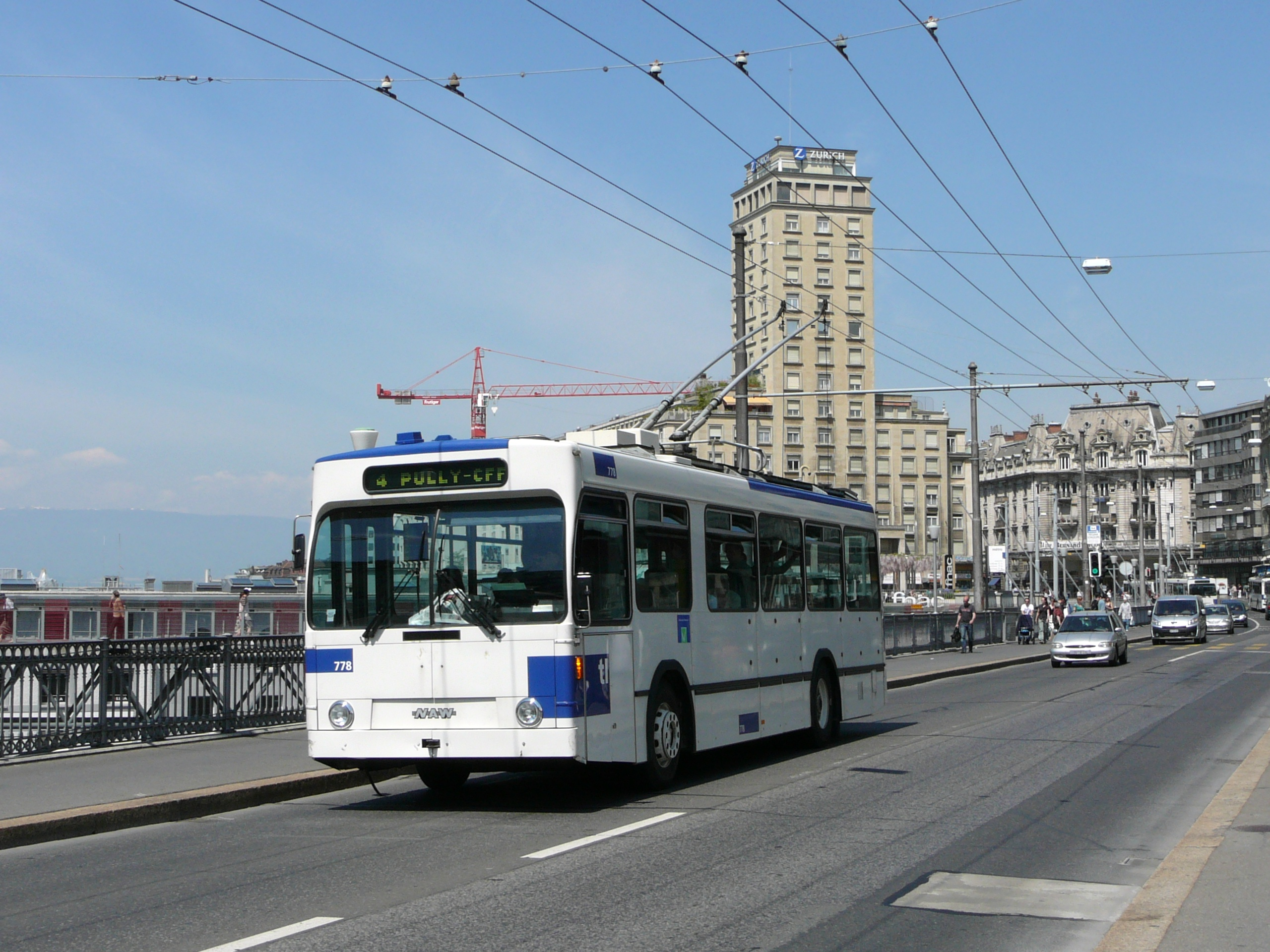 trolleybus des Transports Lausannois